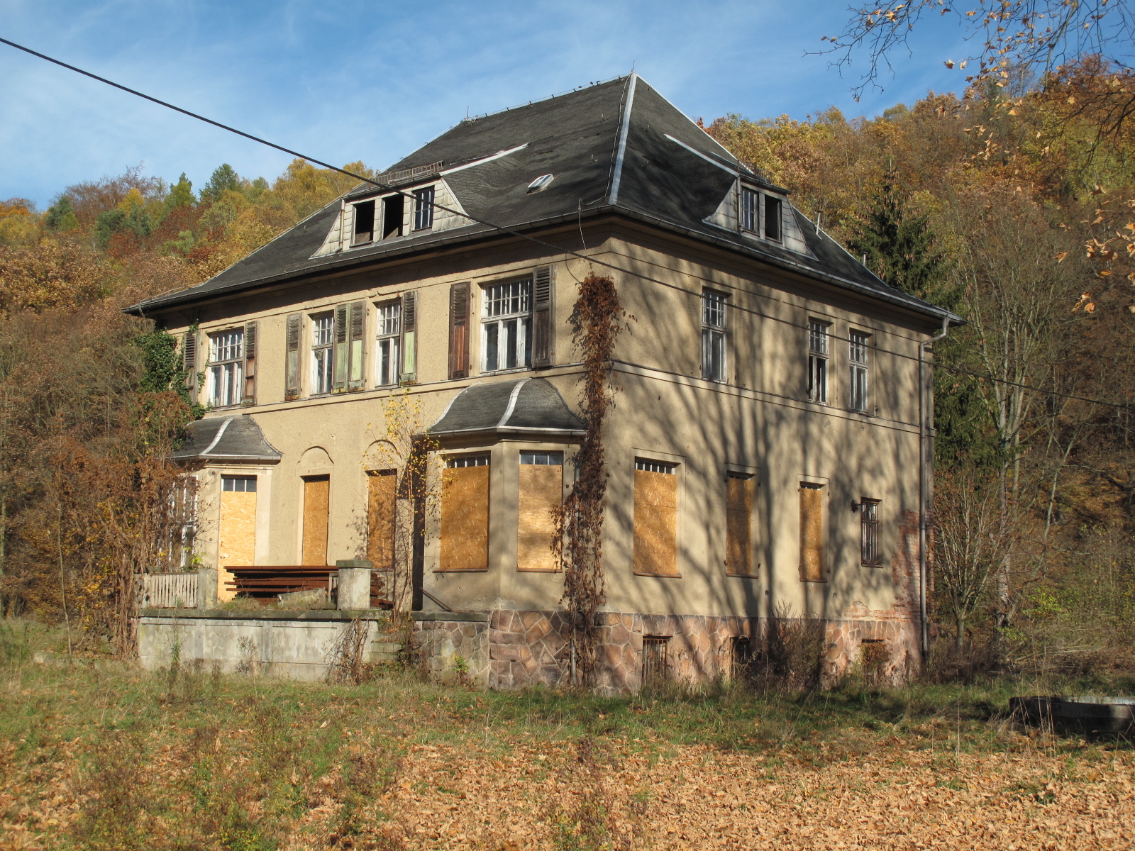 Das als Fabrikantenvilla erbaute Gebäude wurde von 1933 bis 1937 als Wohnhaus für die Führer und Kommandanten des KZ Sachsenburg genutzt.